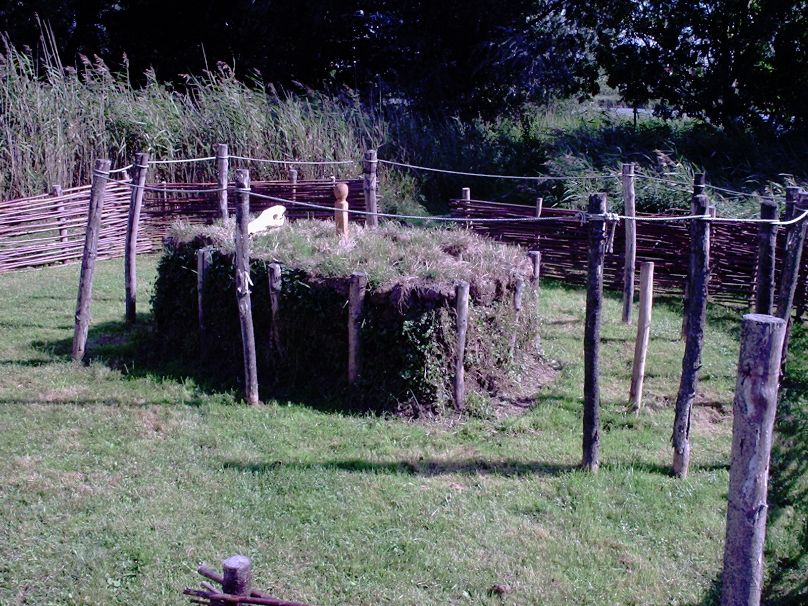 Freigelände am Opfermoor. Ein nach Grabungsbefund gestalteter Altar mit Rinderschädel aus Rasensoden.